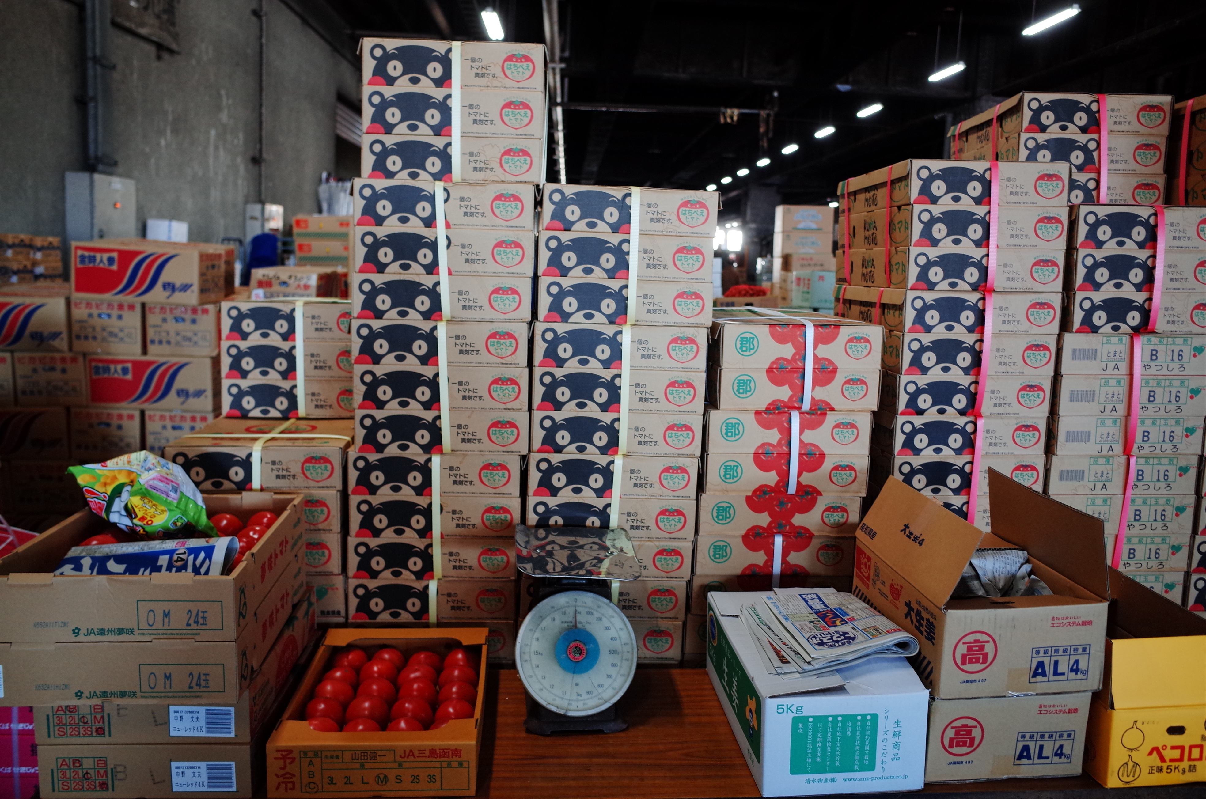 R0201188